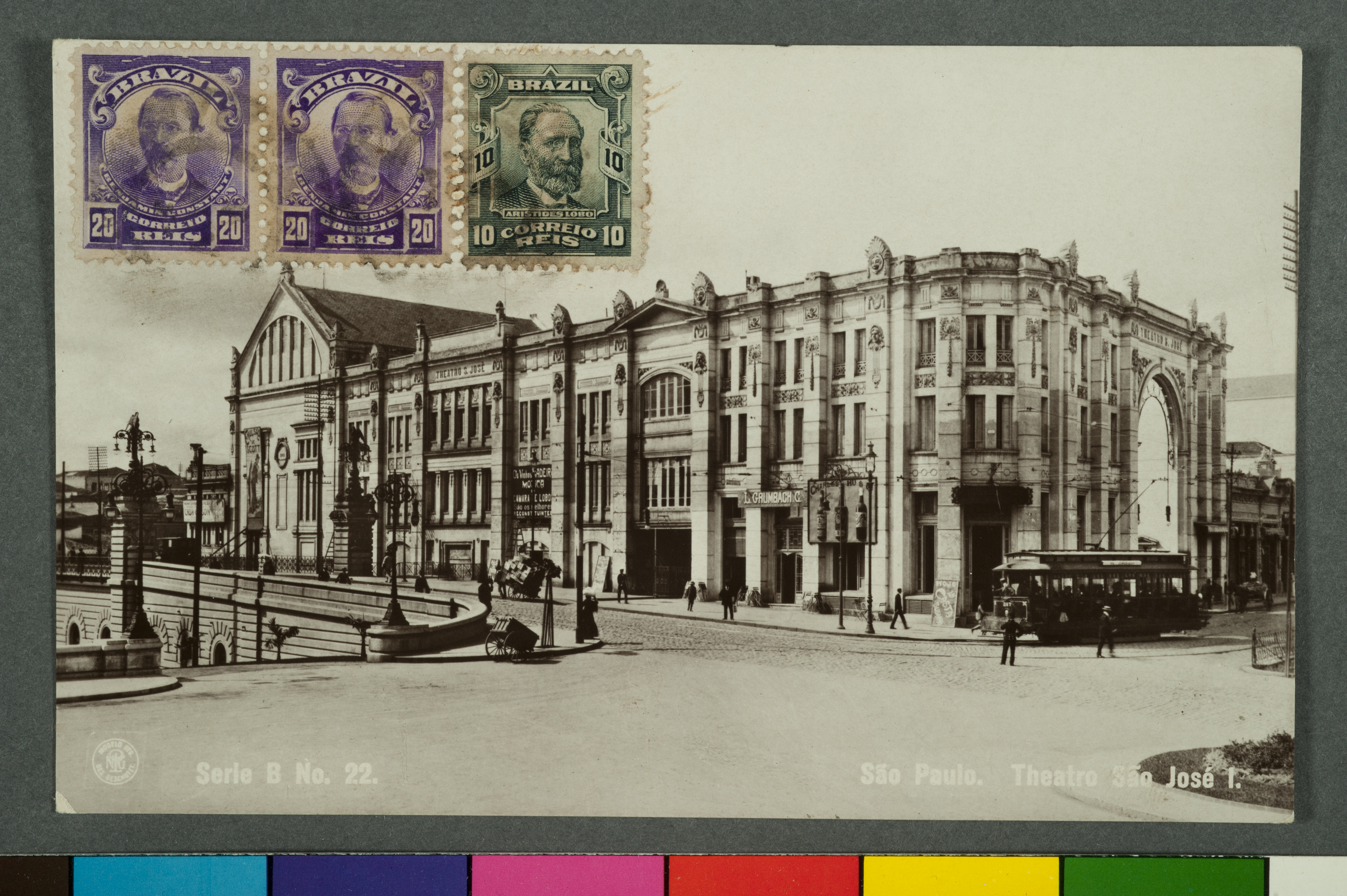 Obra que integra o acervo do Museu Paulista da USP.